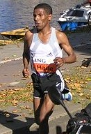 De Ethiopische renner Haile Gebrselassie even voorbij het 35-km-punt, op weg naar zijn parcoursrecord bij de marathon van Amsterdam op 16 oktober 2005. Cropped from Image:Haile_amsterdam2005.jpg